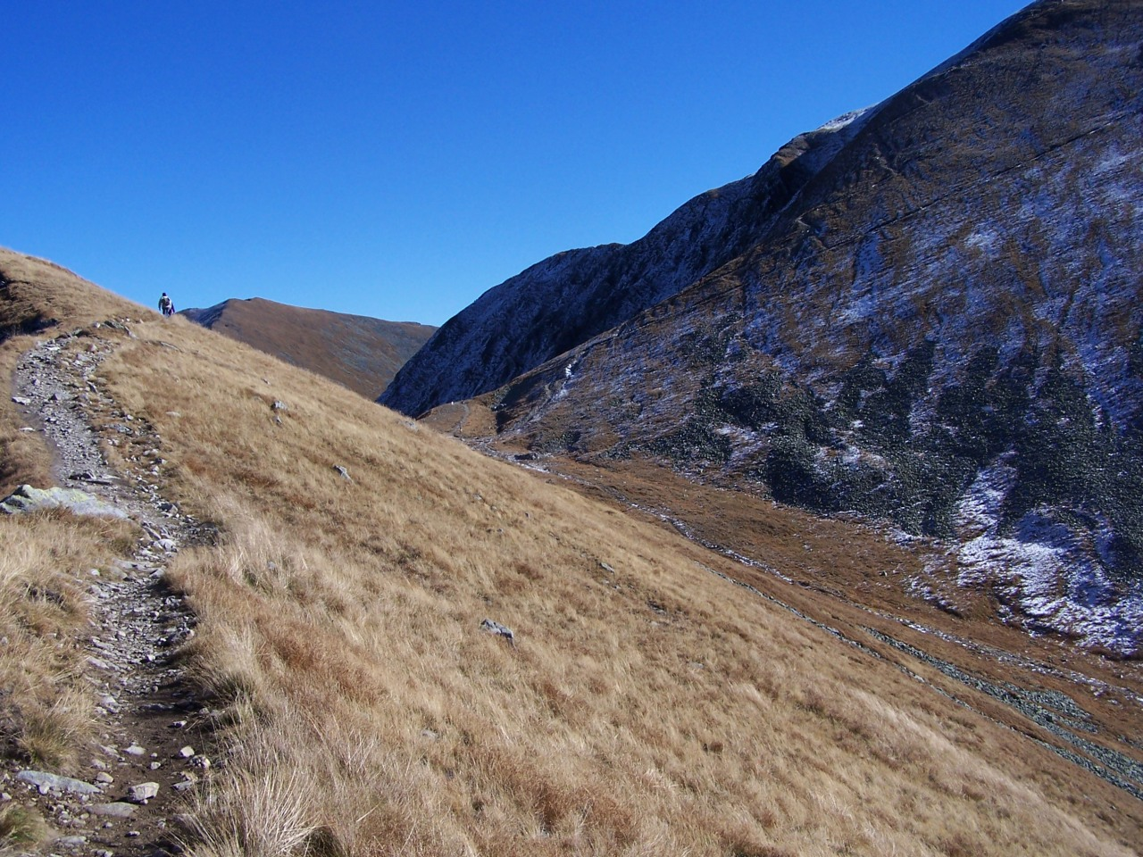 Banista Przełęcz. Po prawej stronie zbocza Bystrej, w głębi Kamienista